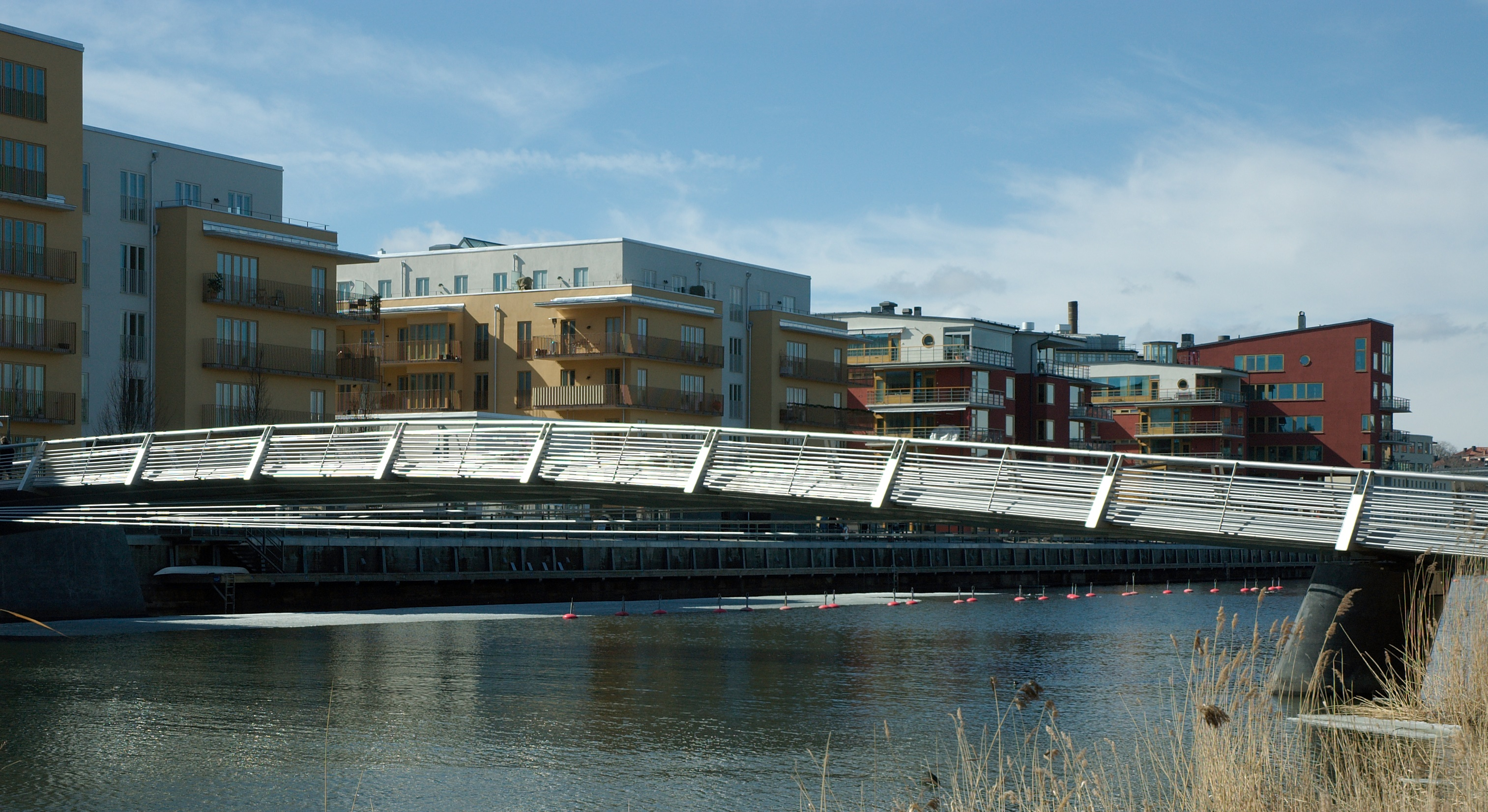 Sicklauddsbron, Stockholm.